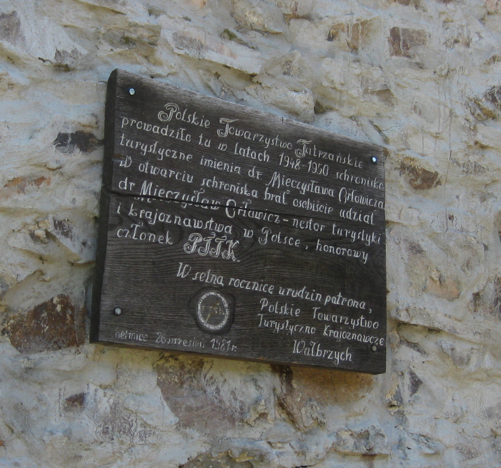 Tablica pamiątkowa z okazji 100 urodzin Mieczysława Orłowicza na ścianie wieży widokowej na Chełmcu.